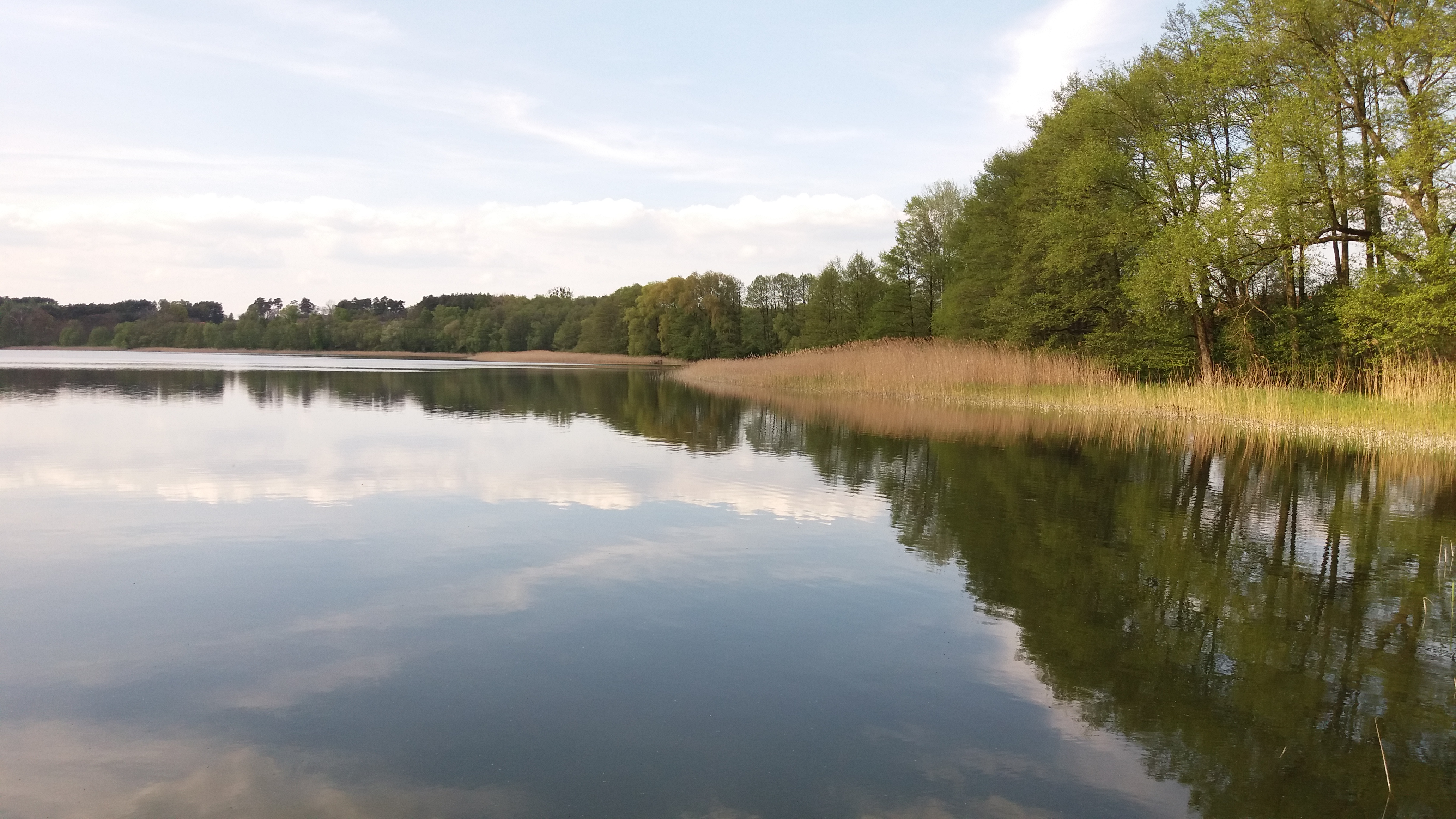 Wieś Zajączkowo (wlkp)